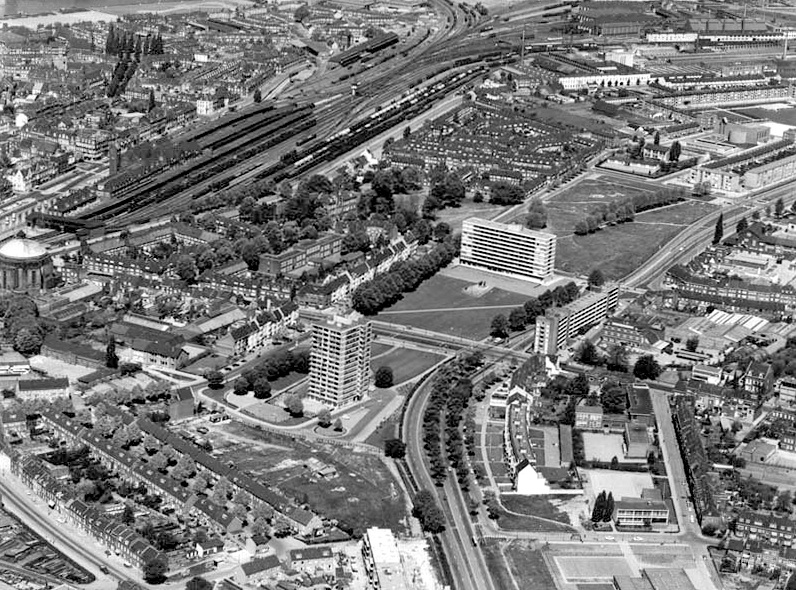 Luchtopname van Maastricht-Oost in 1962, met o.a. de N2 (rechts), het Koningsplien-Oranjeplein (midden) en het spoorwegemplacement (links). Fotocollectie RHCL Maastricht, GAM 6627.